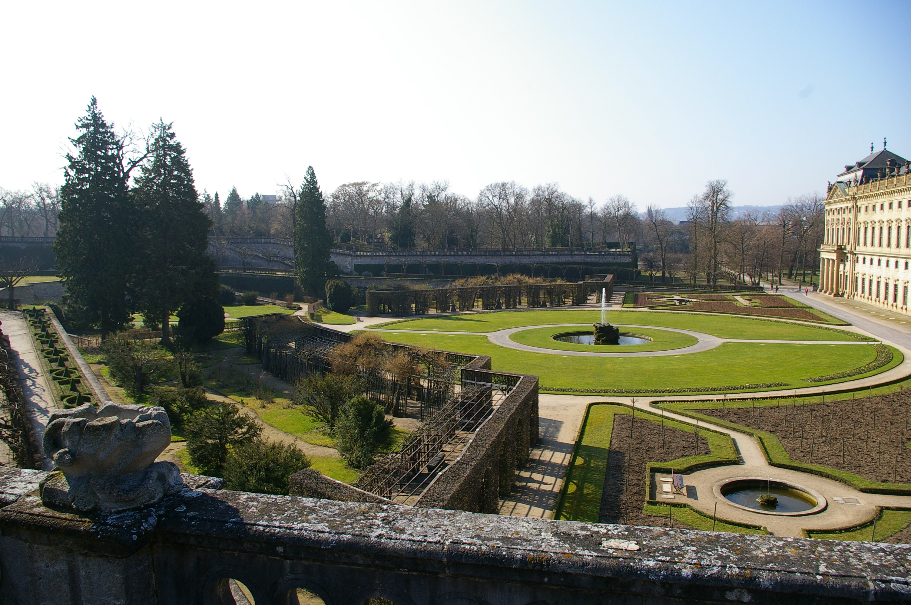 Residenz und Residenzgarten Würzburg